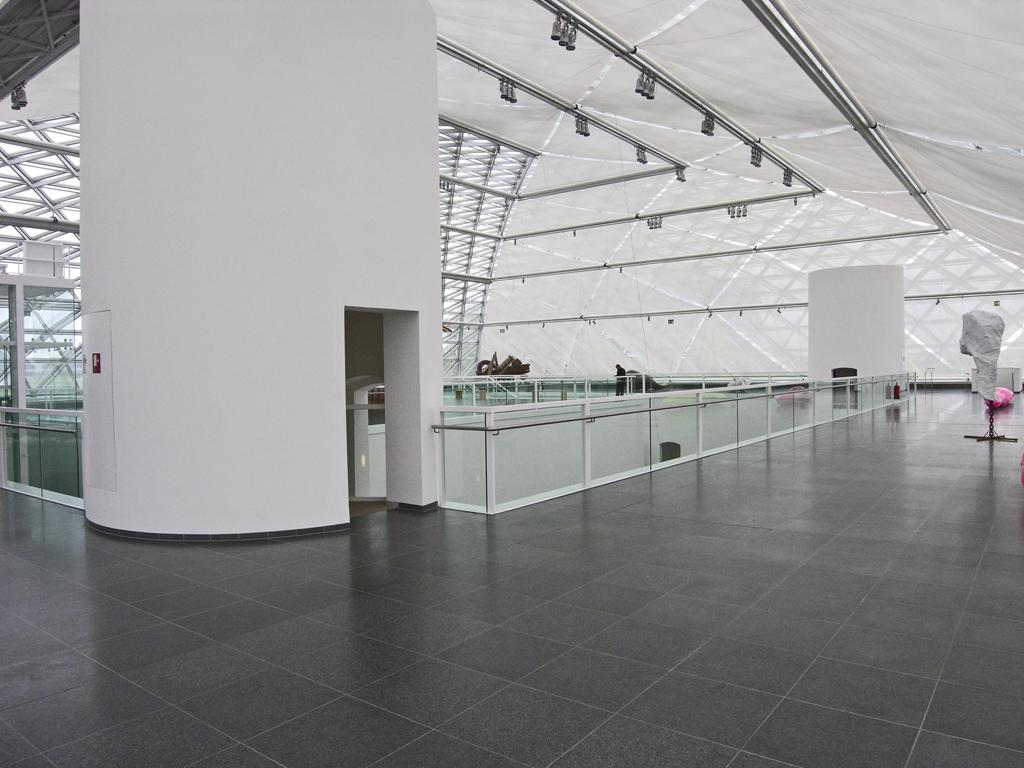 Düsseldorf, Kunstmuseum K21, Dachgeschoss